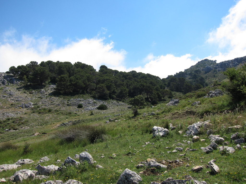 Penon de Ronda